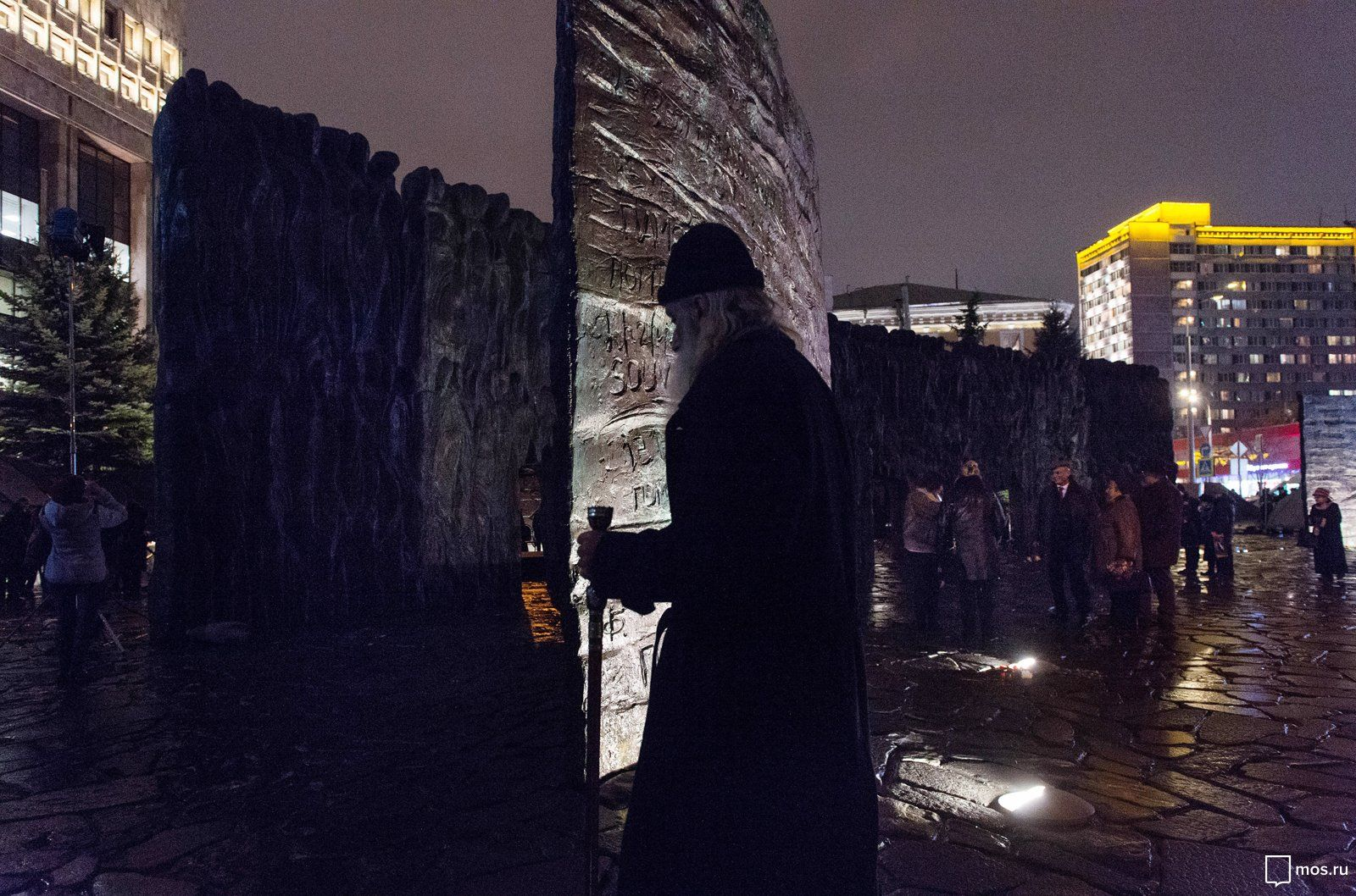 Открытие мемориала «Стена скорби»